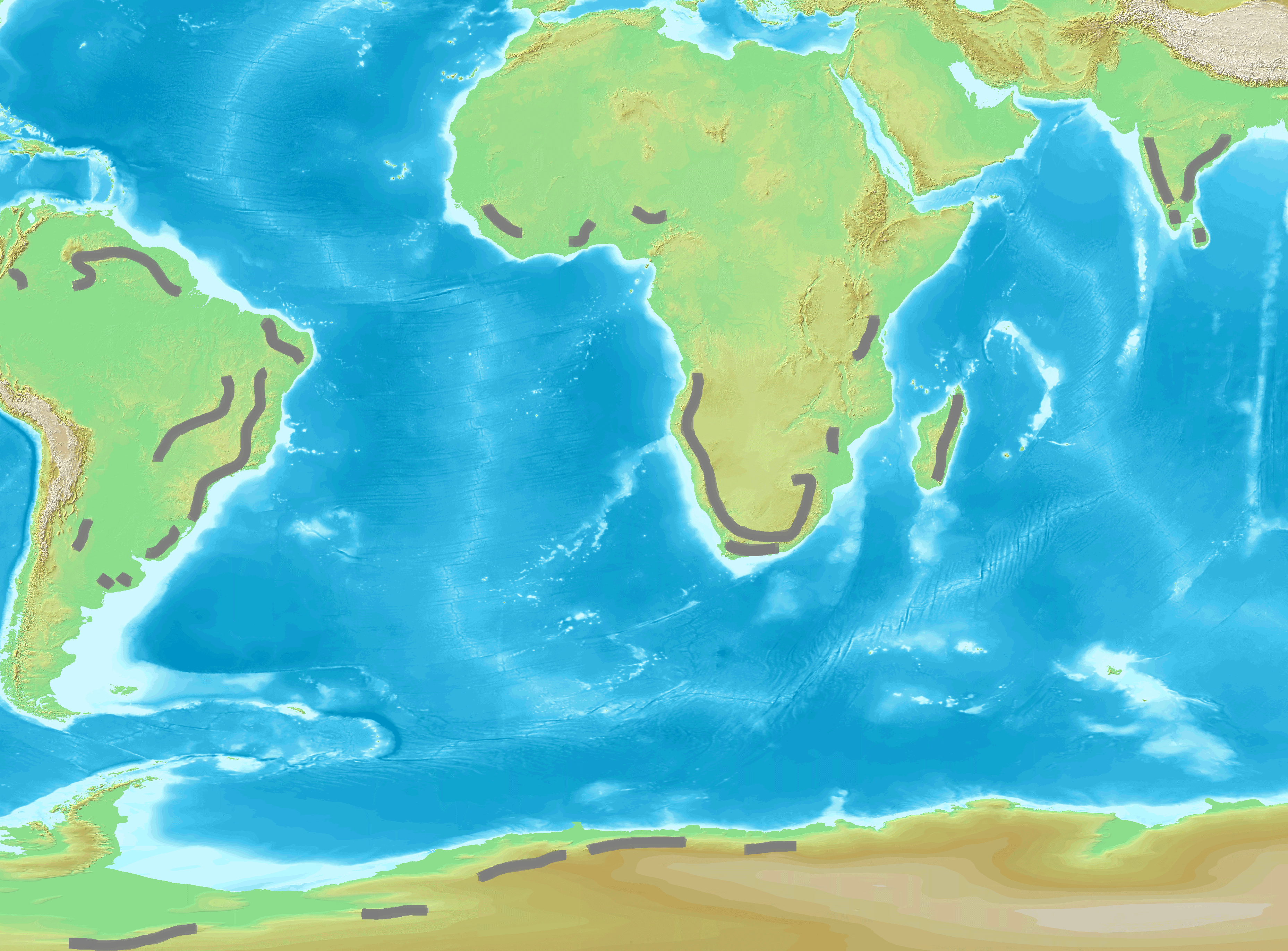 Ceintures montagneuses liées à l'orogenèse pan-africaine.